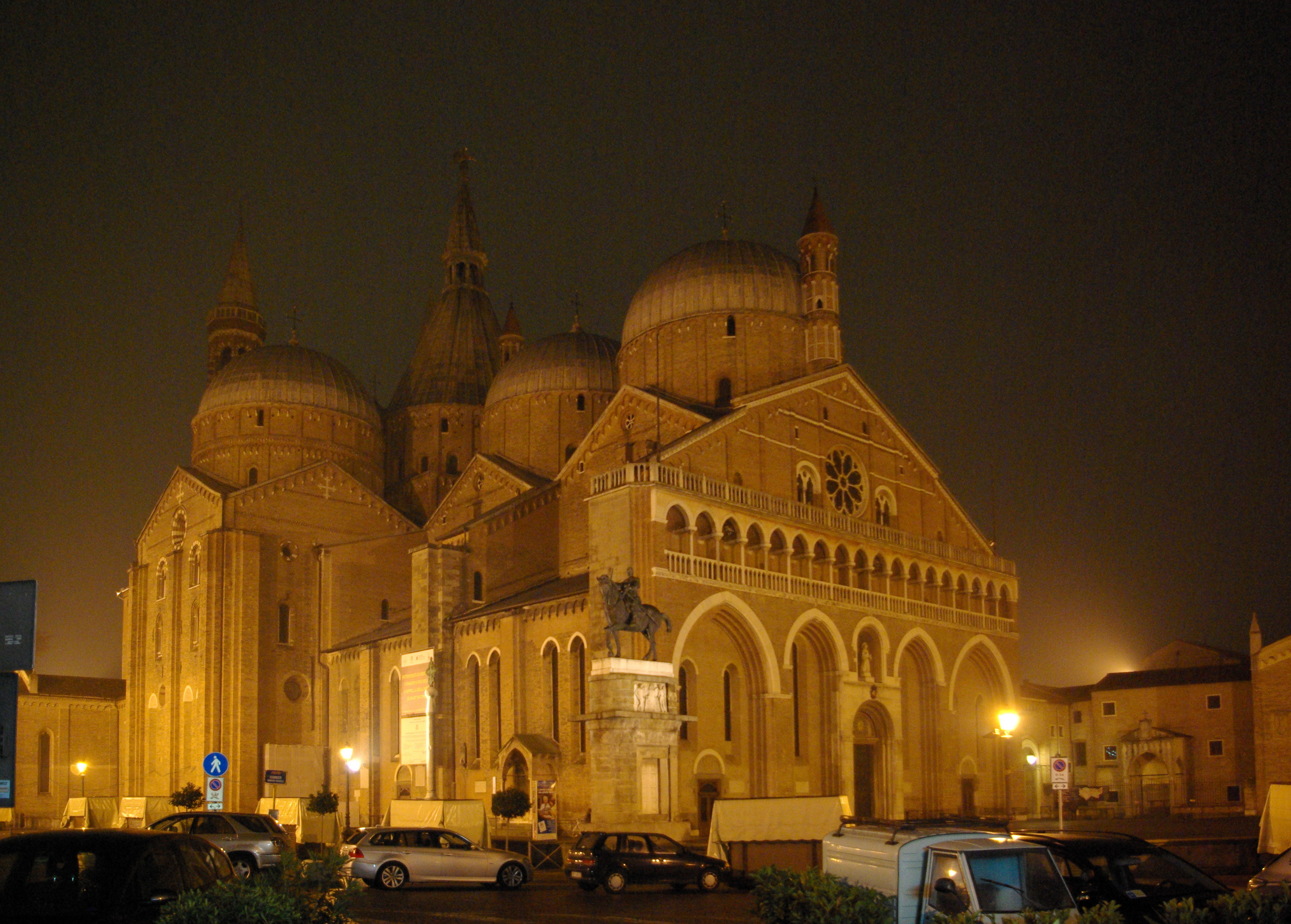 Basilica di Sant'Antonio da Padova